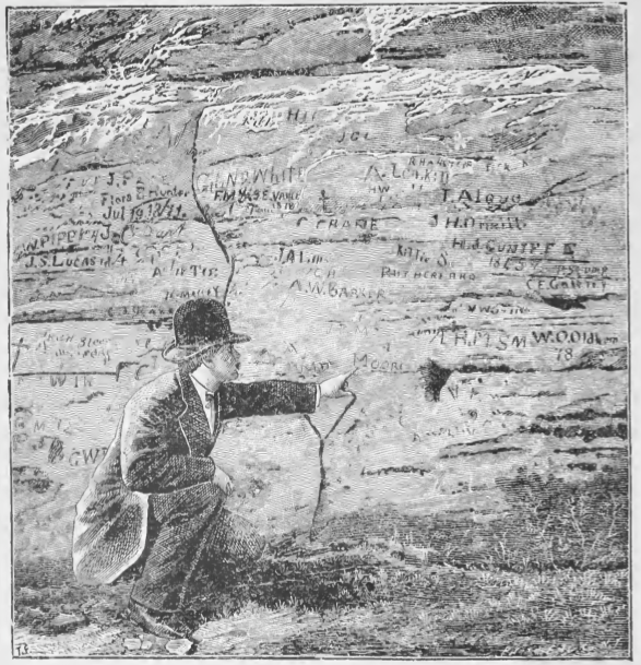 Advertisement, Kansas, USA